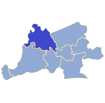 Powiat gorzowski - Gmina Lubiszyn